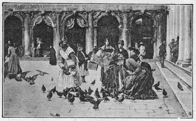 Die Tauben von San Marco